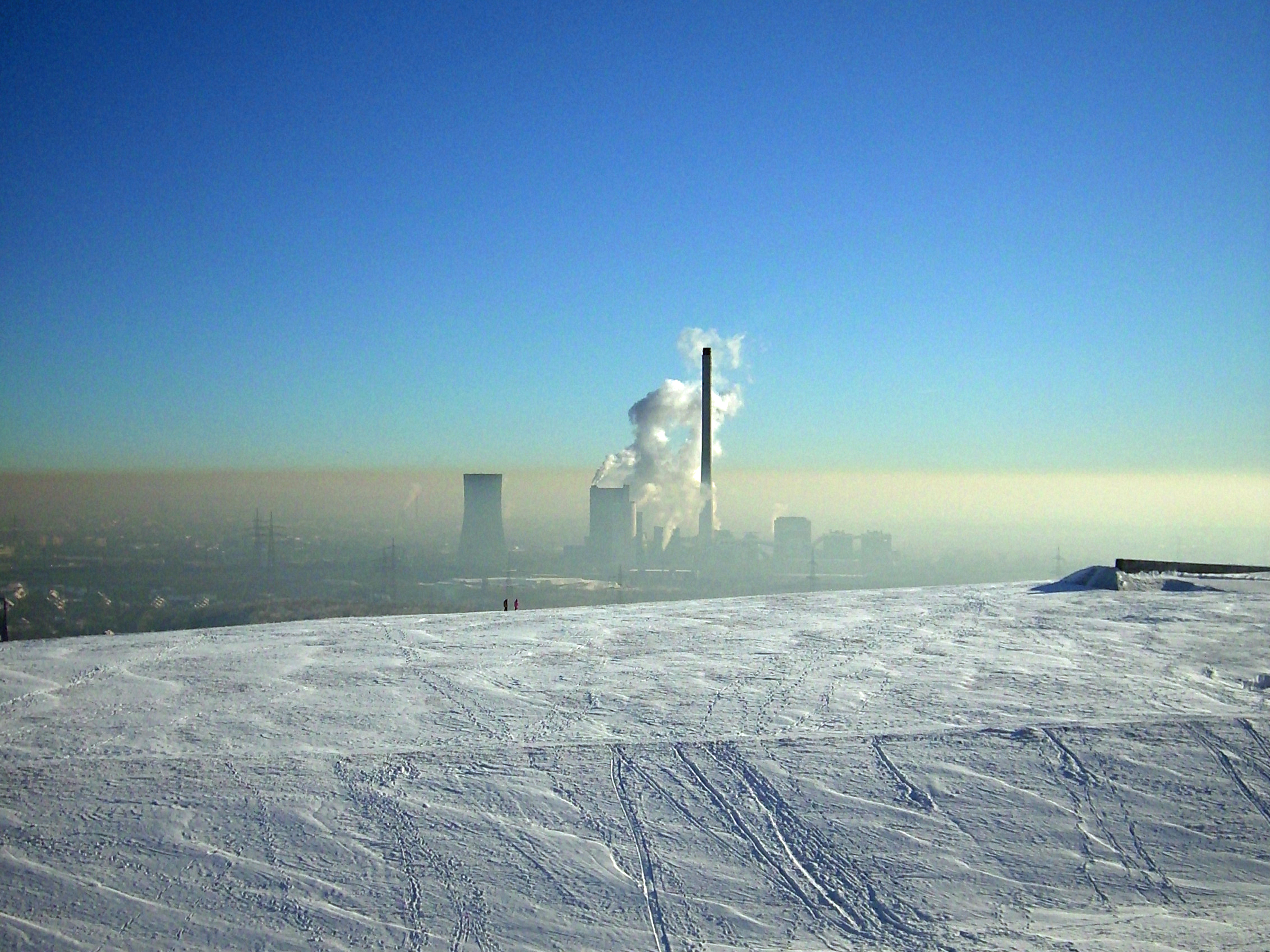 Halde Hoheward im Winter